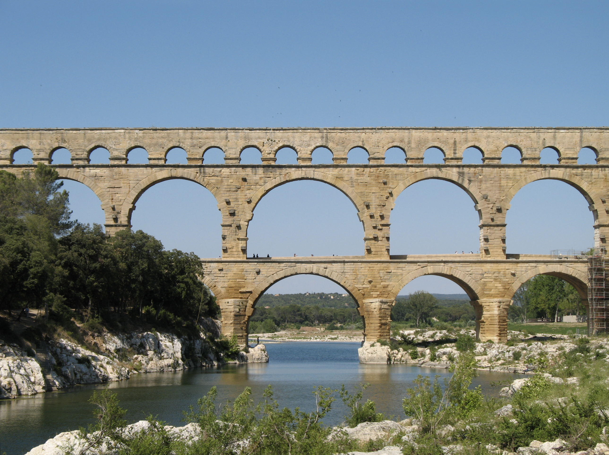 Pont du Gard, France